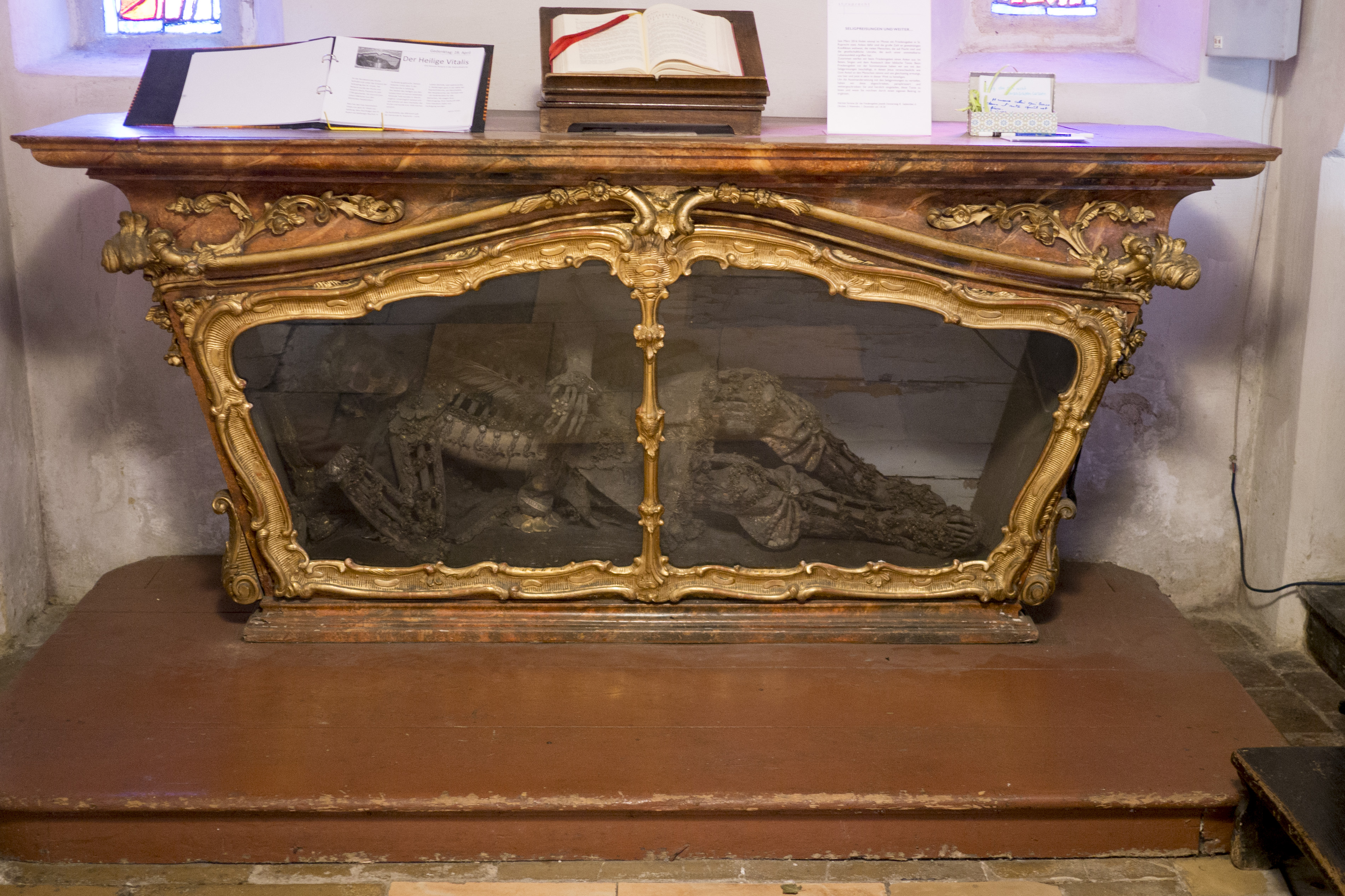 Ruprechtskirche. Gebeine des heiligen Vitalis aus Rom. Gestiftet von Maria Theresia. Lostag 28.April = Vitalis (Ravenna)